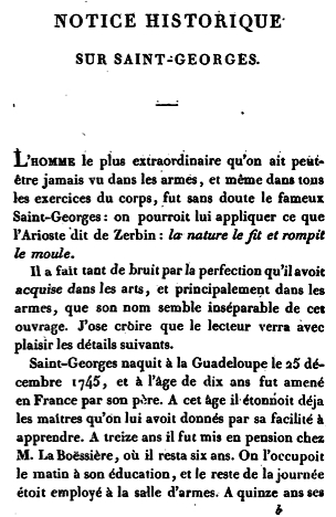 Notice historique sur Saint-Georges. Antoine Texier La Boëssière, Traité de l'art des armes, à l'usage des professeurs et des amateurs,1818